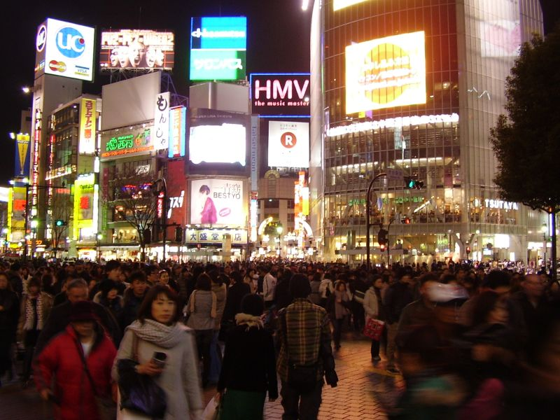 Křižovatka Center Gai ve čtvrti Šibuja, Tokio, vlastní foto